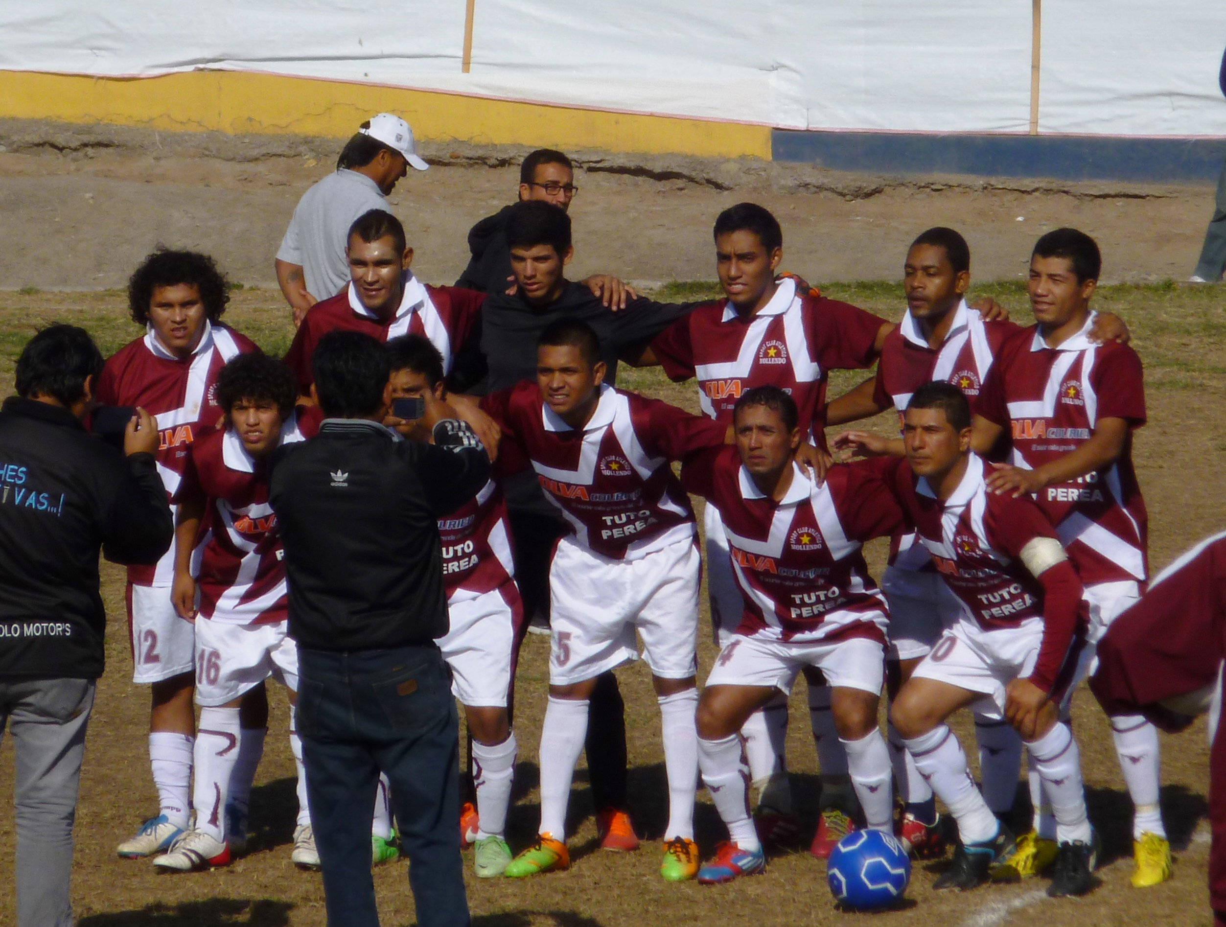 Once del Club Atlético Mollendo de la provincia de Islay, versión 2014.